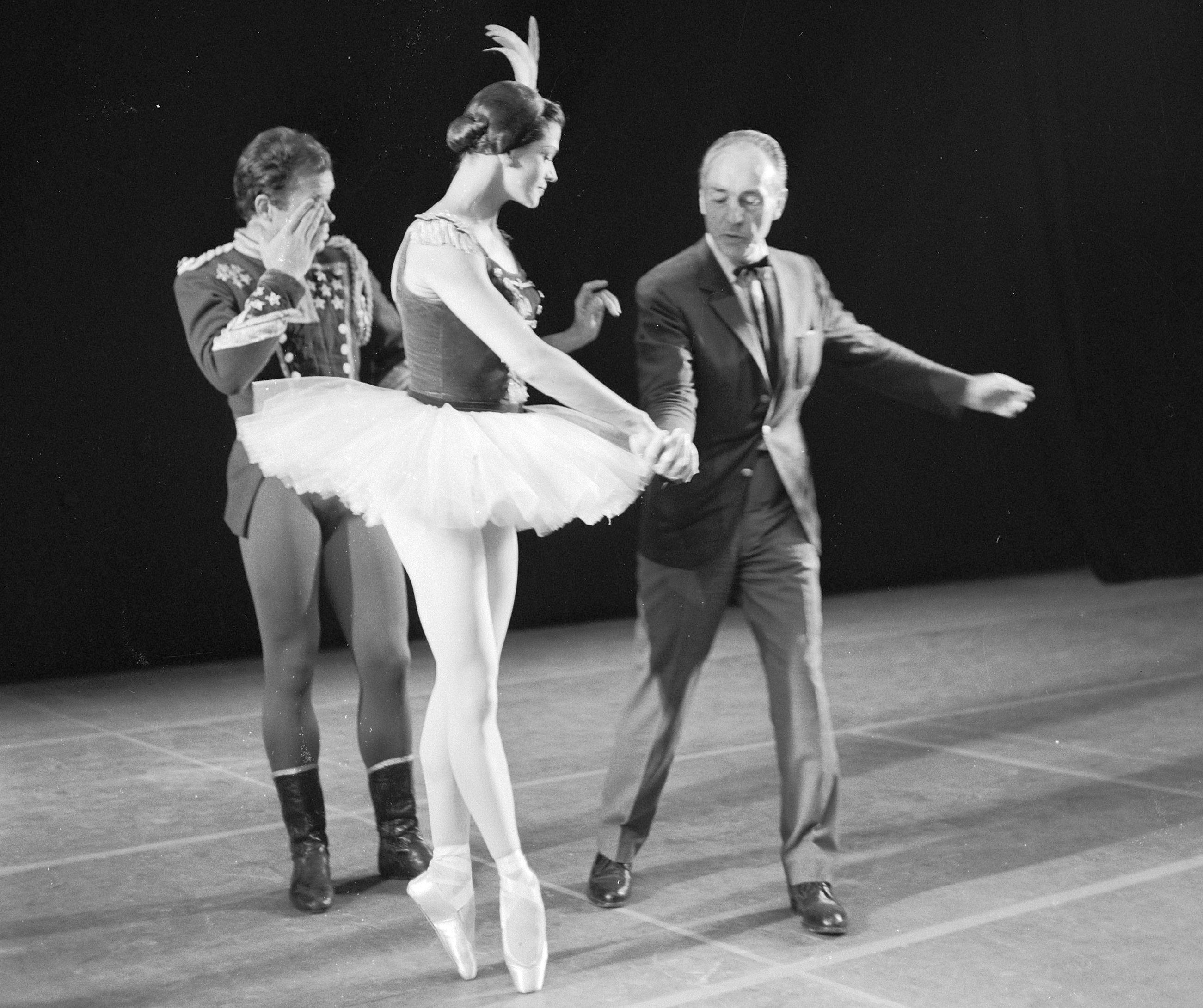 New York City Ballet in Amsterdam, repetitie New York City Ballet. Choreograaf George Balanchine geeft aanwijzingen.